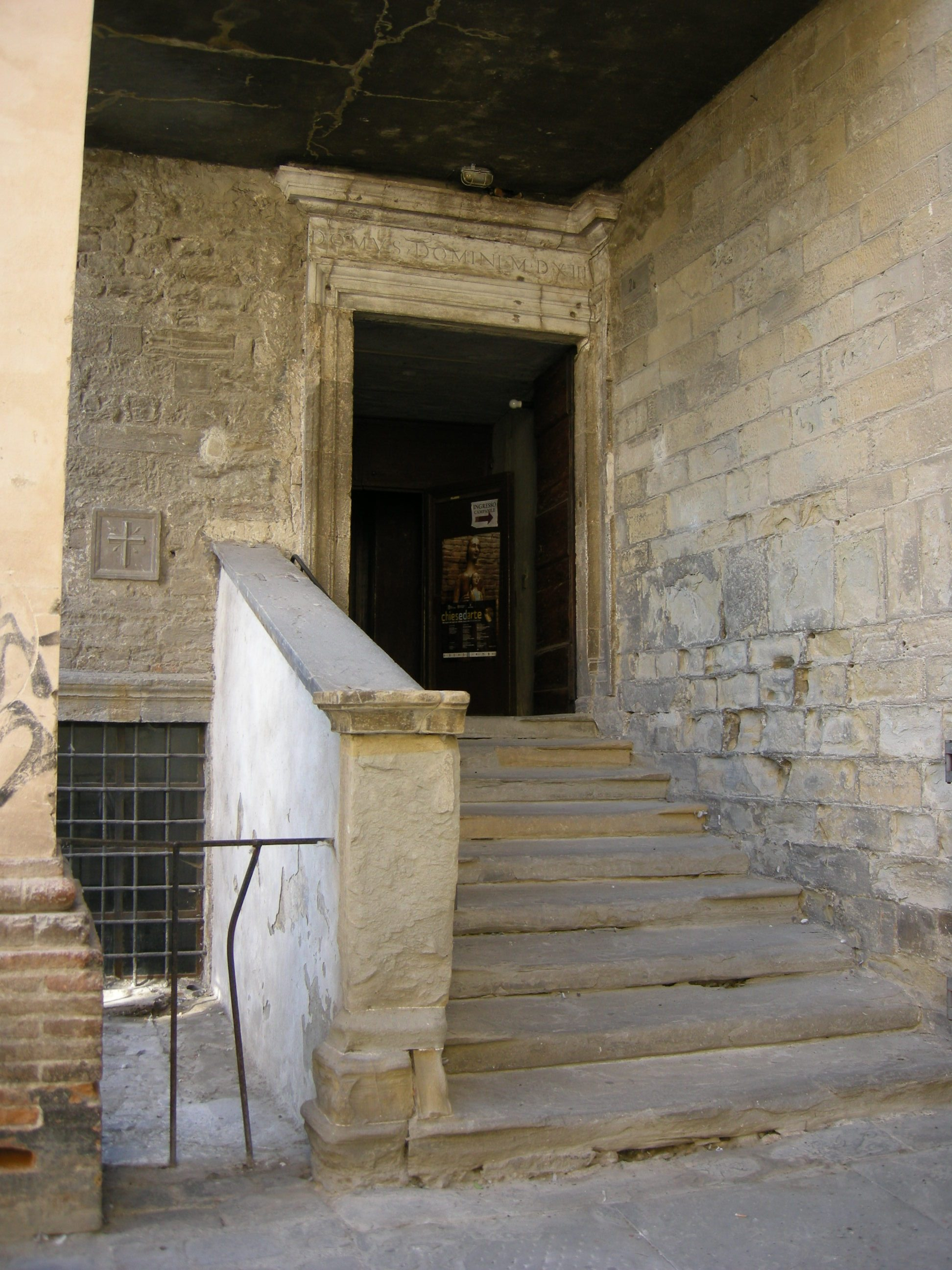 Città di castello, campanile rotondo, entrata